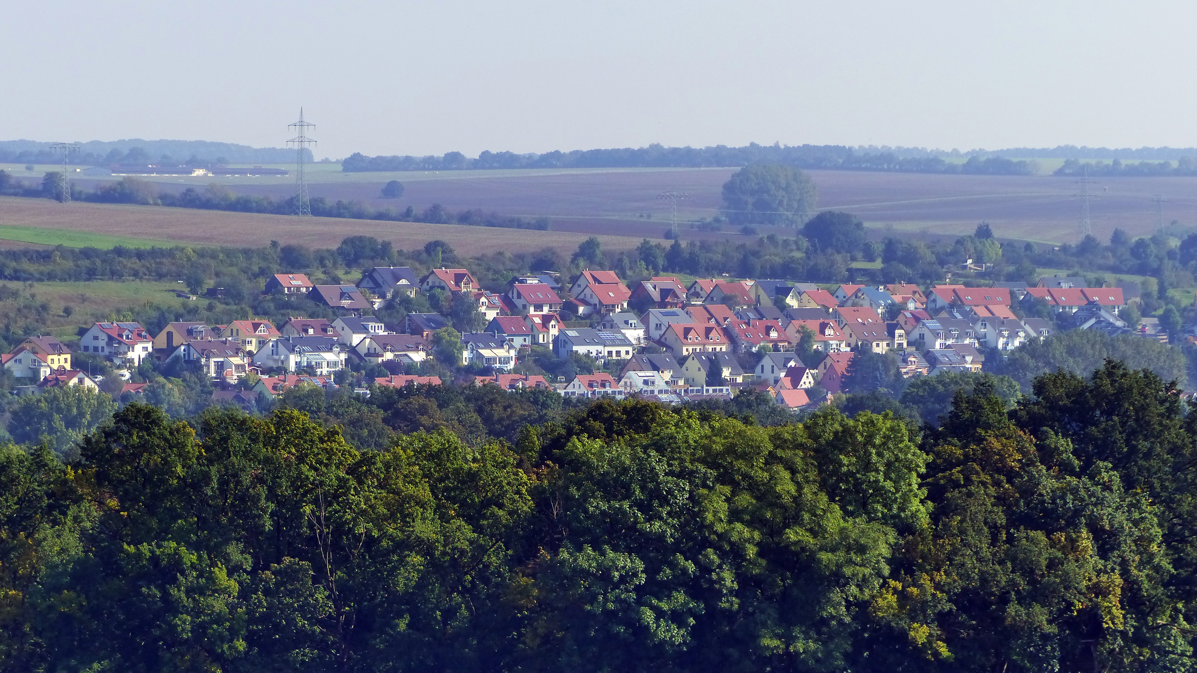 Blick auf Taubach vom Schloss Belvedere aus